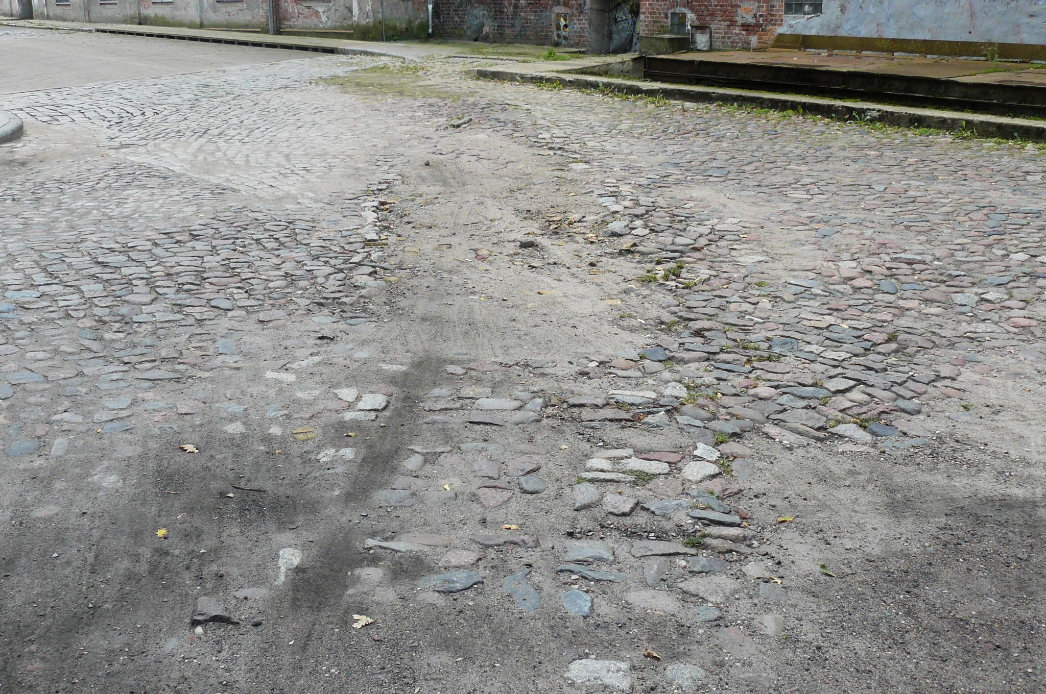 Młyn Dahlmanna w Obornikach (także Młyn Słonawy).